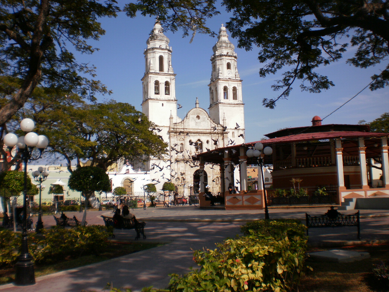 Paseando en el parque principal